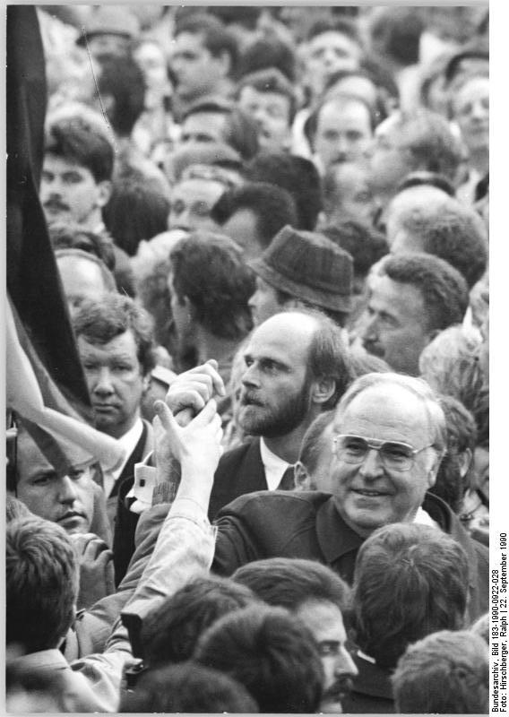 Weimar, CDU-Kundgebung, Helmut Kohl ADN Ralph Hirschberger 22.9.90 Thüringen: Bundeskanzler Helmut Kohl auf einer CDU-Wahlkampfveranstaltung im Weimar. Tausende Einwohner empfingen ihn mit Hochrufen und der Deutschlandfahne. Abgebildete Personen: Kohl, Helmut: Bundeskanzler, Ministerpräsident von Rheinland-Pfalz, CDU, Bundesrepublik Deutschland (GND 118564595)